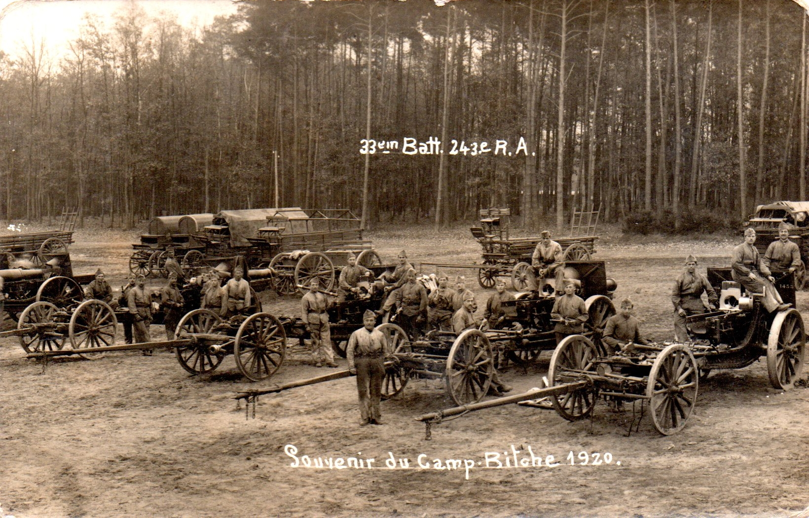 Canonniers de la 33e batterie du 243e régiment d'artillerie, accompagnés de leurs pièces de 155mm court Schneider modèle 1917, camp de Bitche (Moselle) novembre 1920.